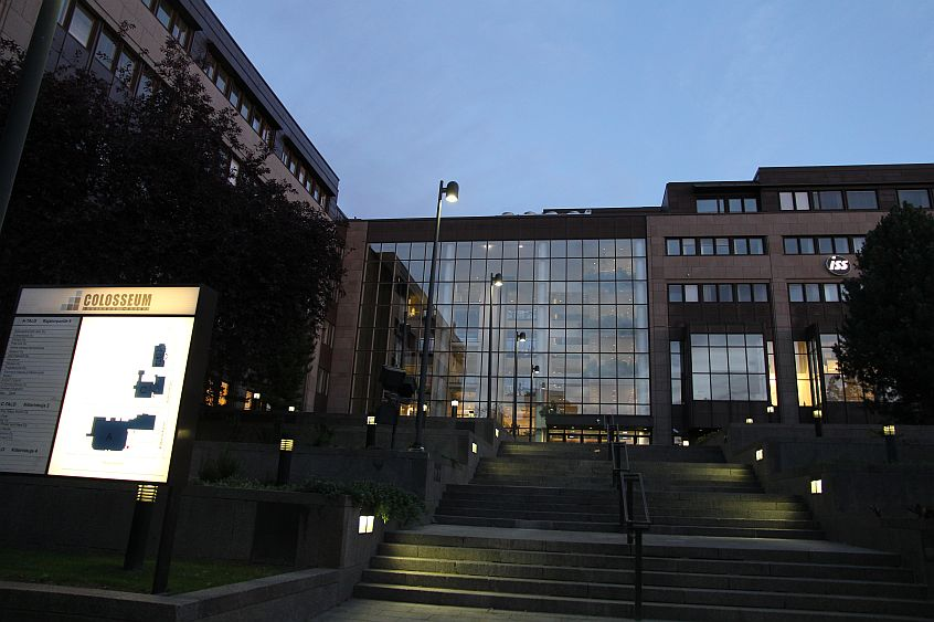 Yritystalo Colosseumia Vantaan Myyrmäessä. Rakennusryppäässä sijaitsee esimerkiksi kiinteistöpalveluyritys ISS Palvelut Oy:n pääkonttori. ISS Palvelut on osa tanskalaista ISS-konsernia. Huom: Muista säilyttää viittaus kuvaajaan, mikäli käytät kuvaa.